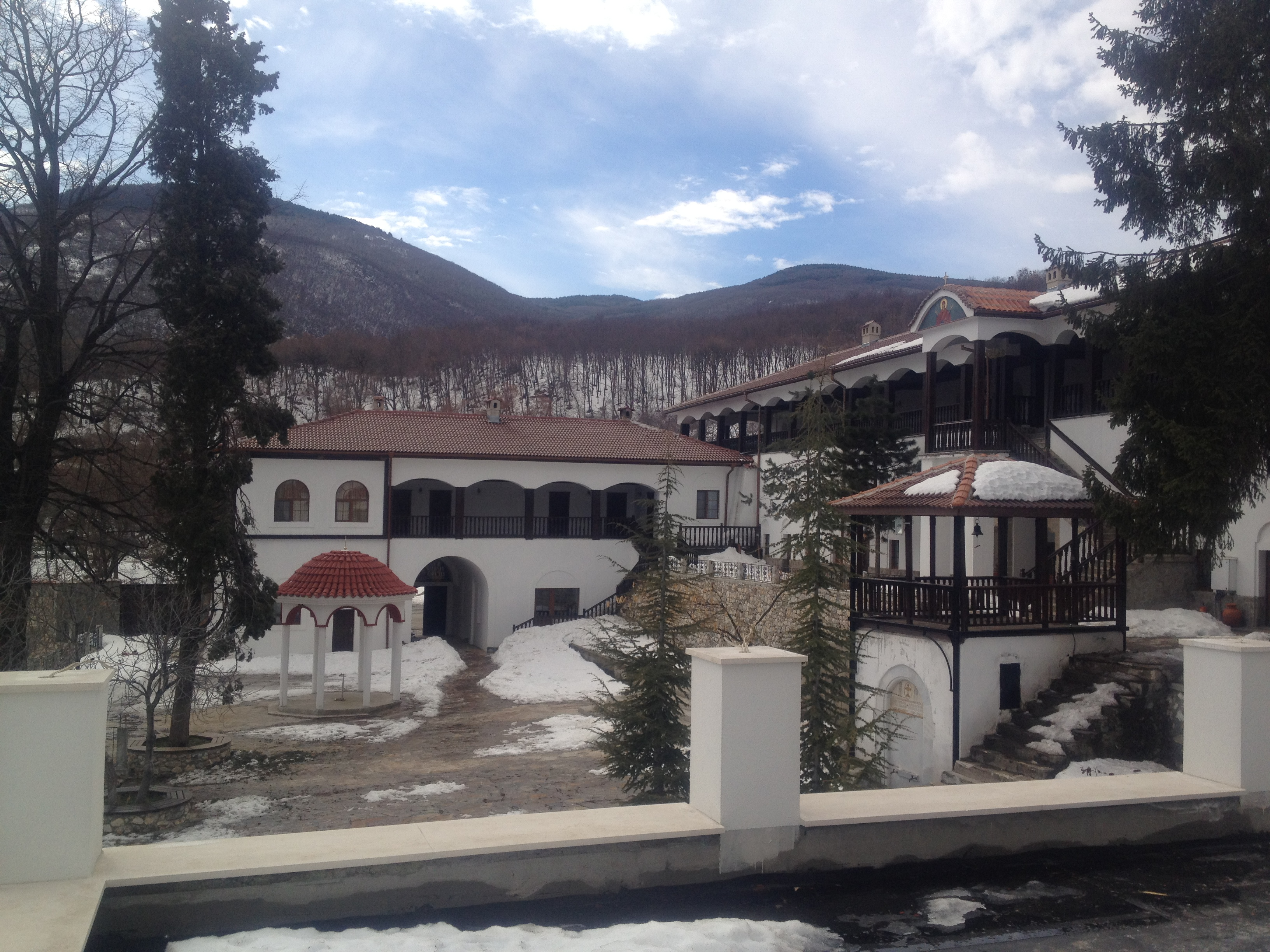 Кукленски манастир Св. Св. Козма и Дамян